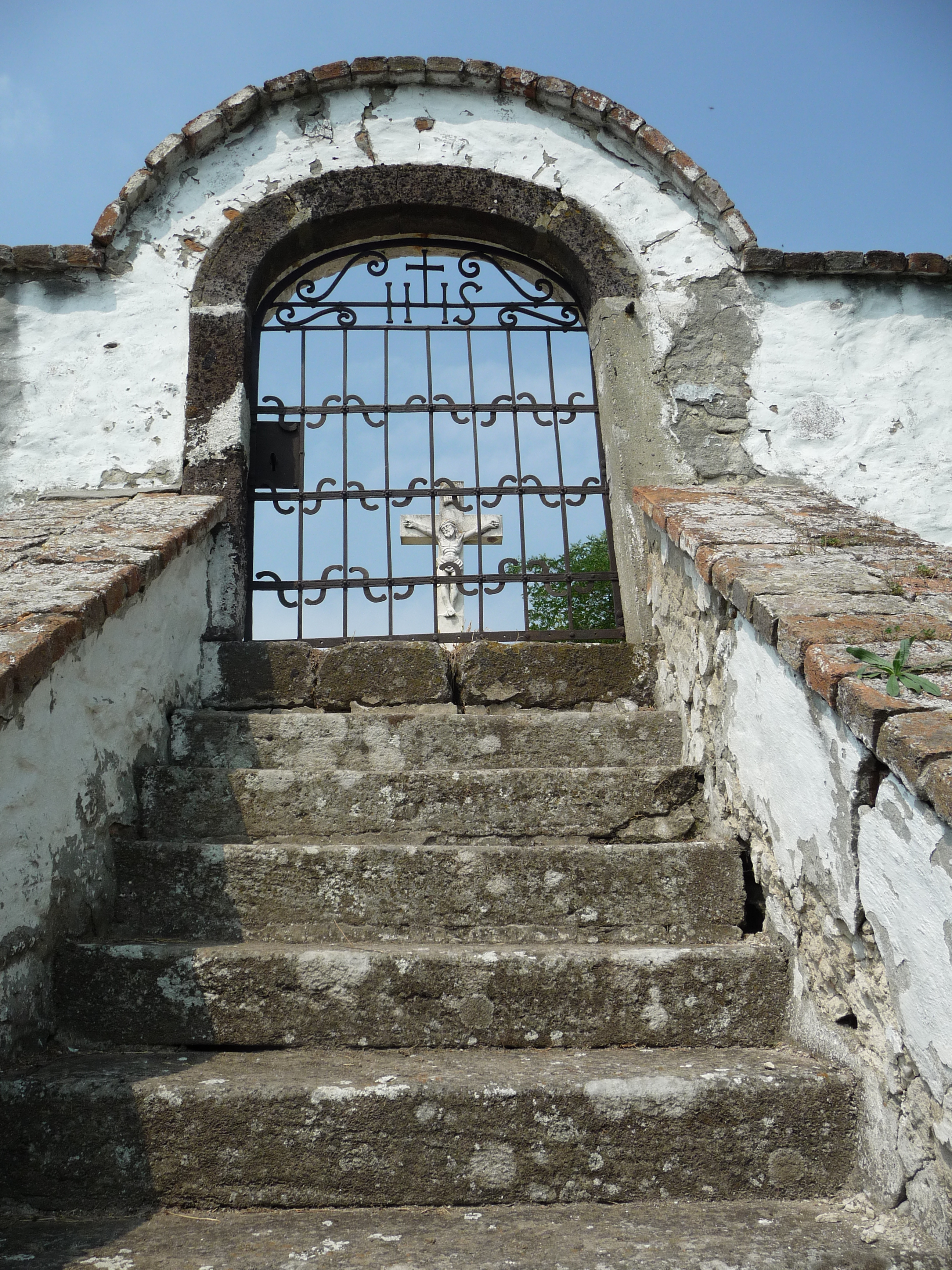 A kovácsoltvas kapu a Kálvária-hegyen, Buják